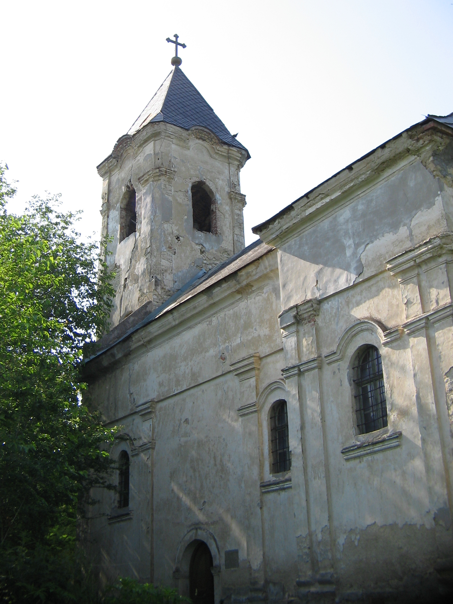 Church in Grabovo village, in Serbia